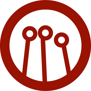 Logo sociálního družstva Tři ocásci sou družstvo. Sociální družstvo!